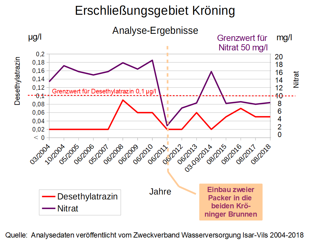 Auswertung der jährlichen Wasseranalyse zum Erschließungsgebiet Kröning für den Zeitraum 2004 bis 2014